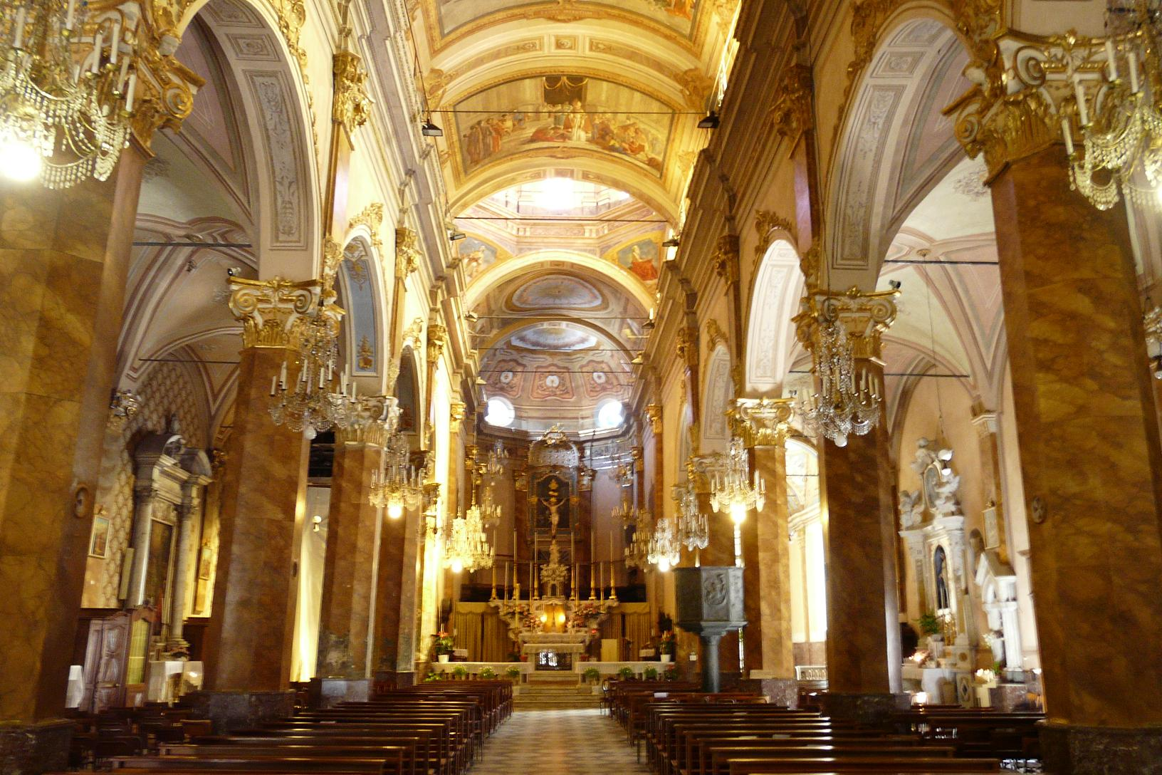 Chiesa di Sant'Ambrogio, Alassio, Liguria, Italia